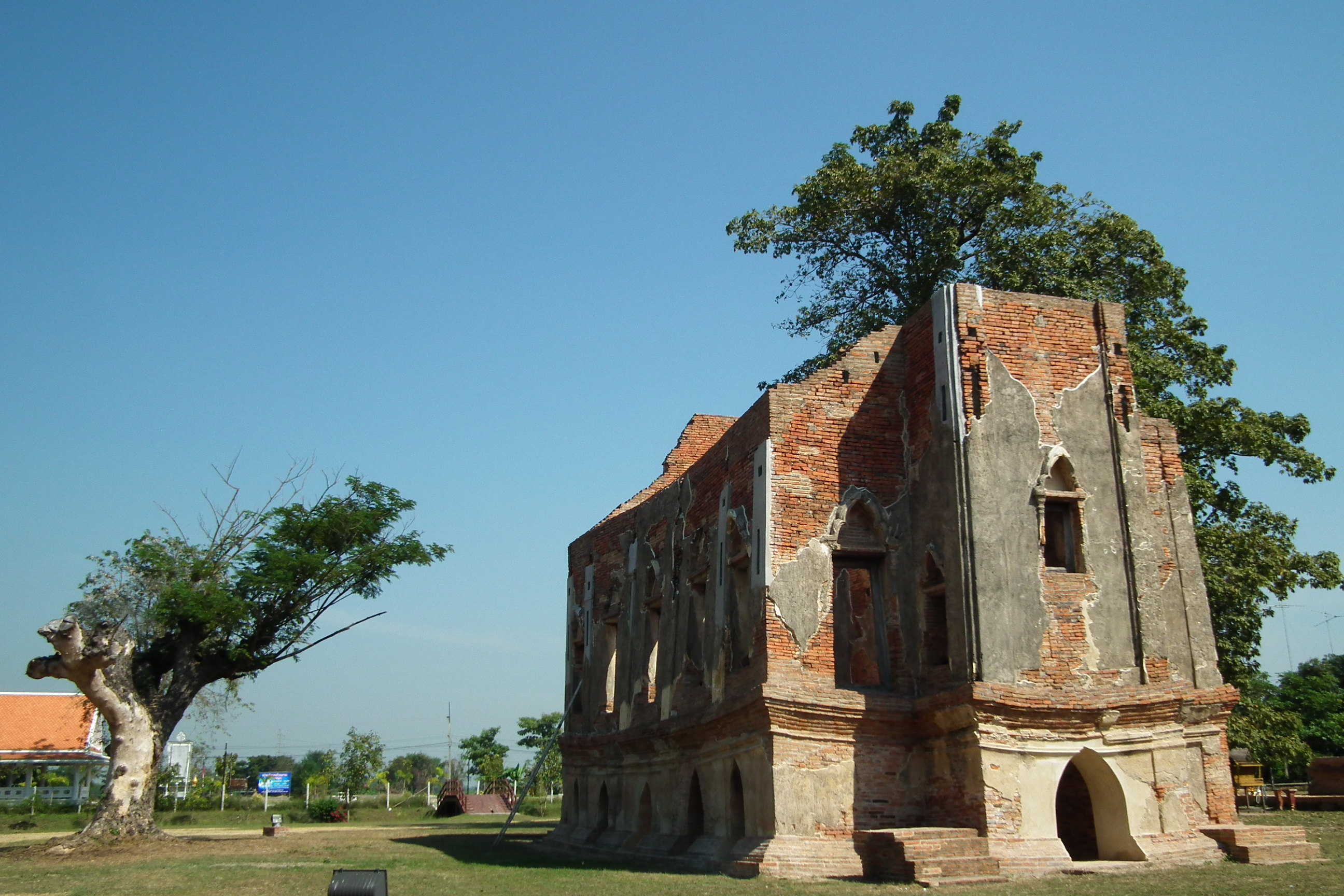 พระตำหนักคำหยาด(พระที่นั่งคำหยาด)